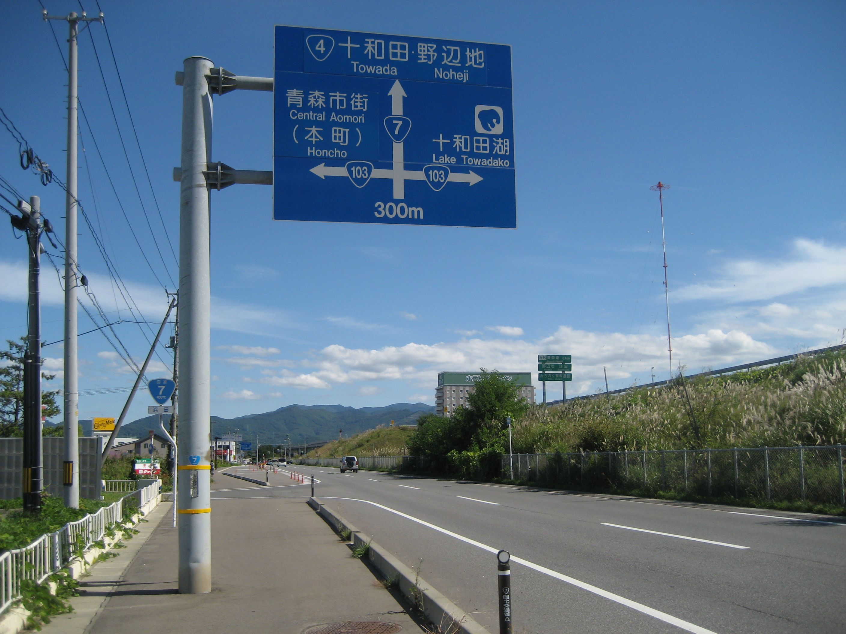 国道7号線青森環状道路青森県青森市浜田付近